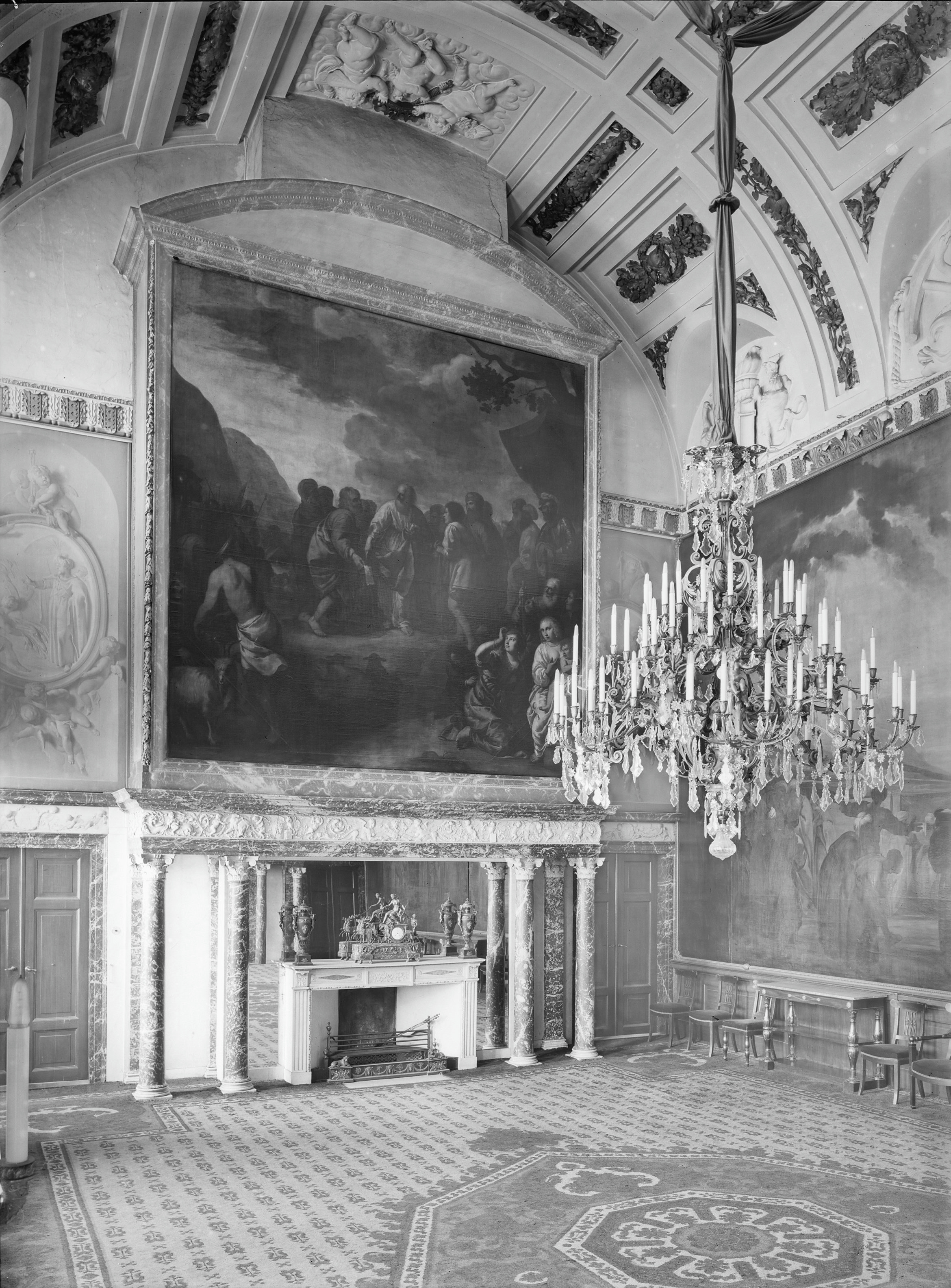 Koninklijk Paleis: Interieur, schoorsteenstuk in Raadzaal of Mozeszaal met grote kroonluchter op de voorgrond